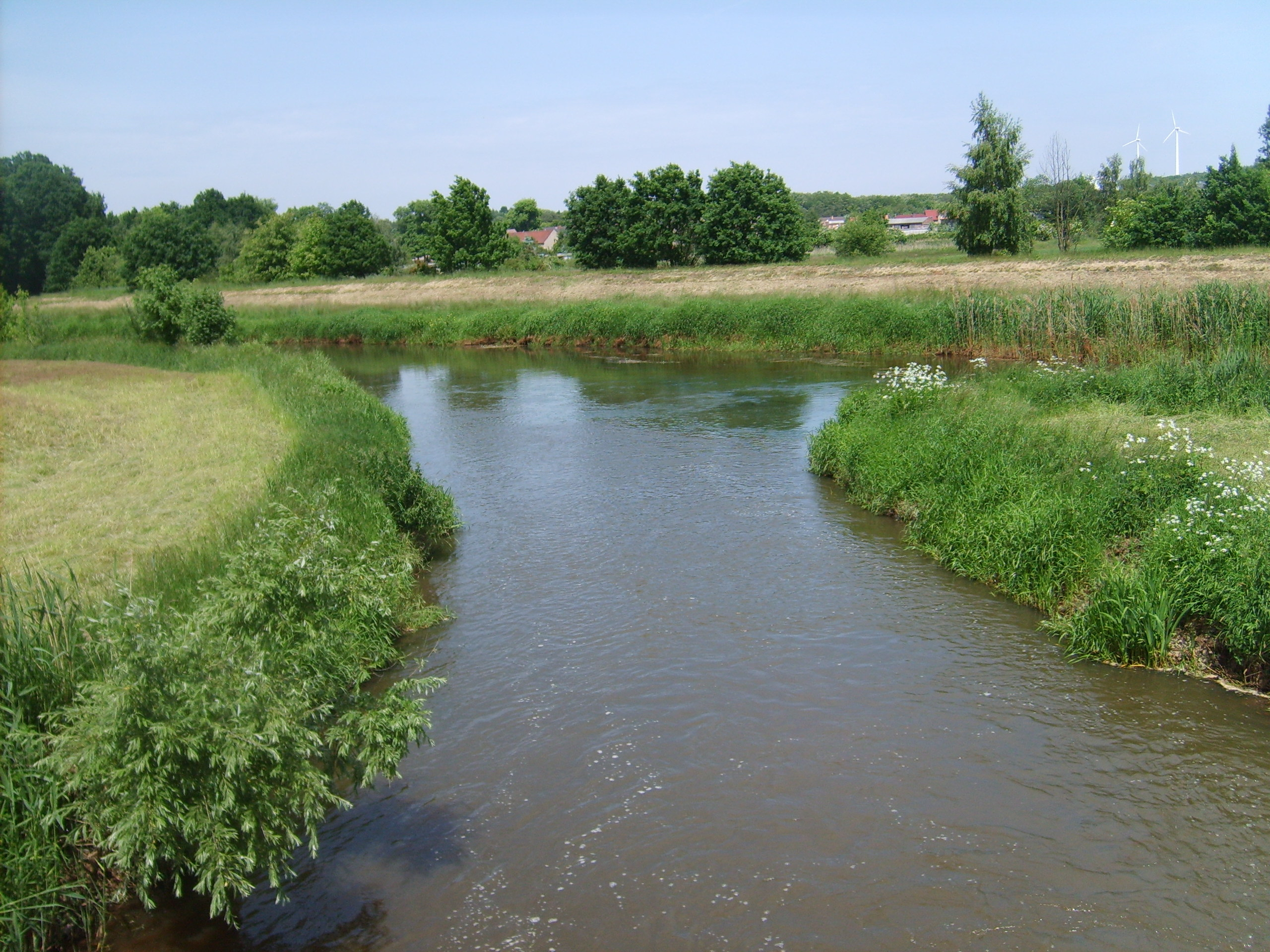 Die Mündung der Großen Röder bei Würdenhain kurz vor ihrem Eintritt in die Schwarze Elster.